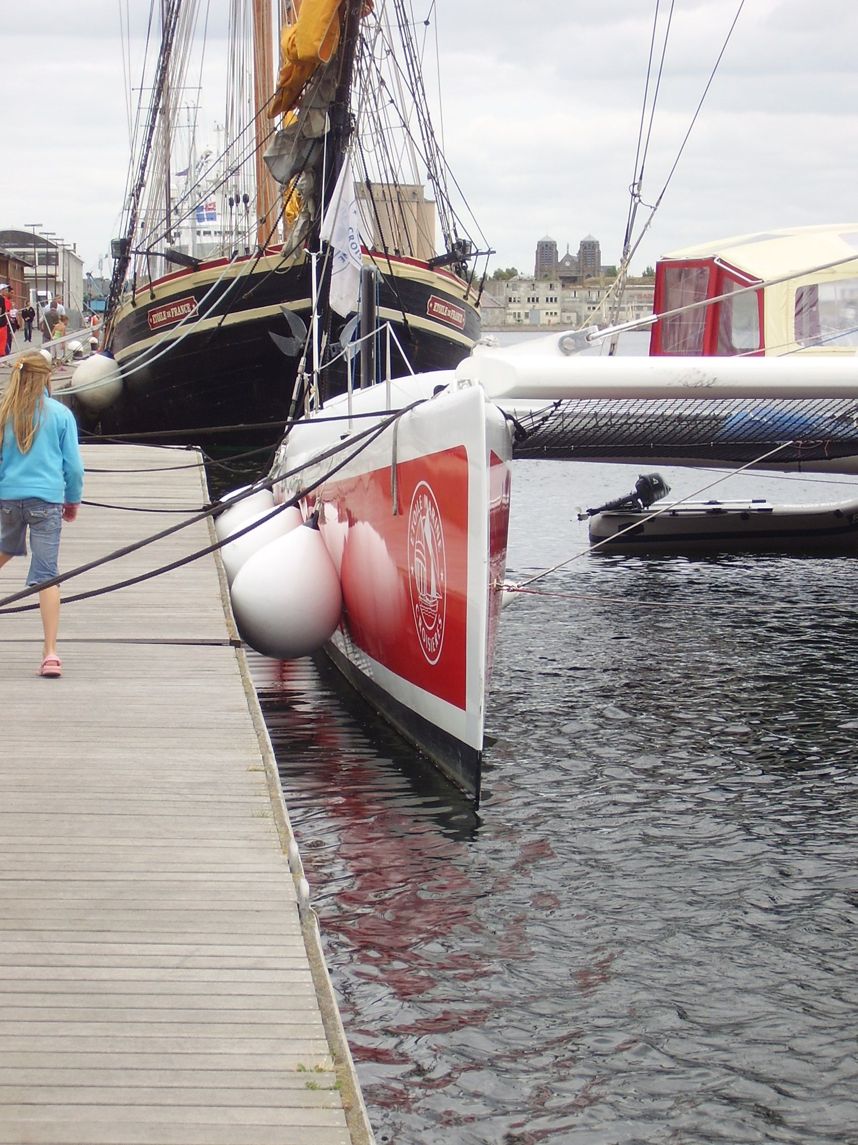 Katamaran; Saint Malo Frankreich